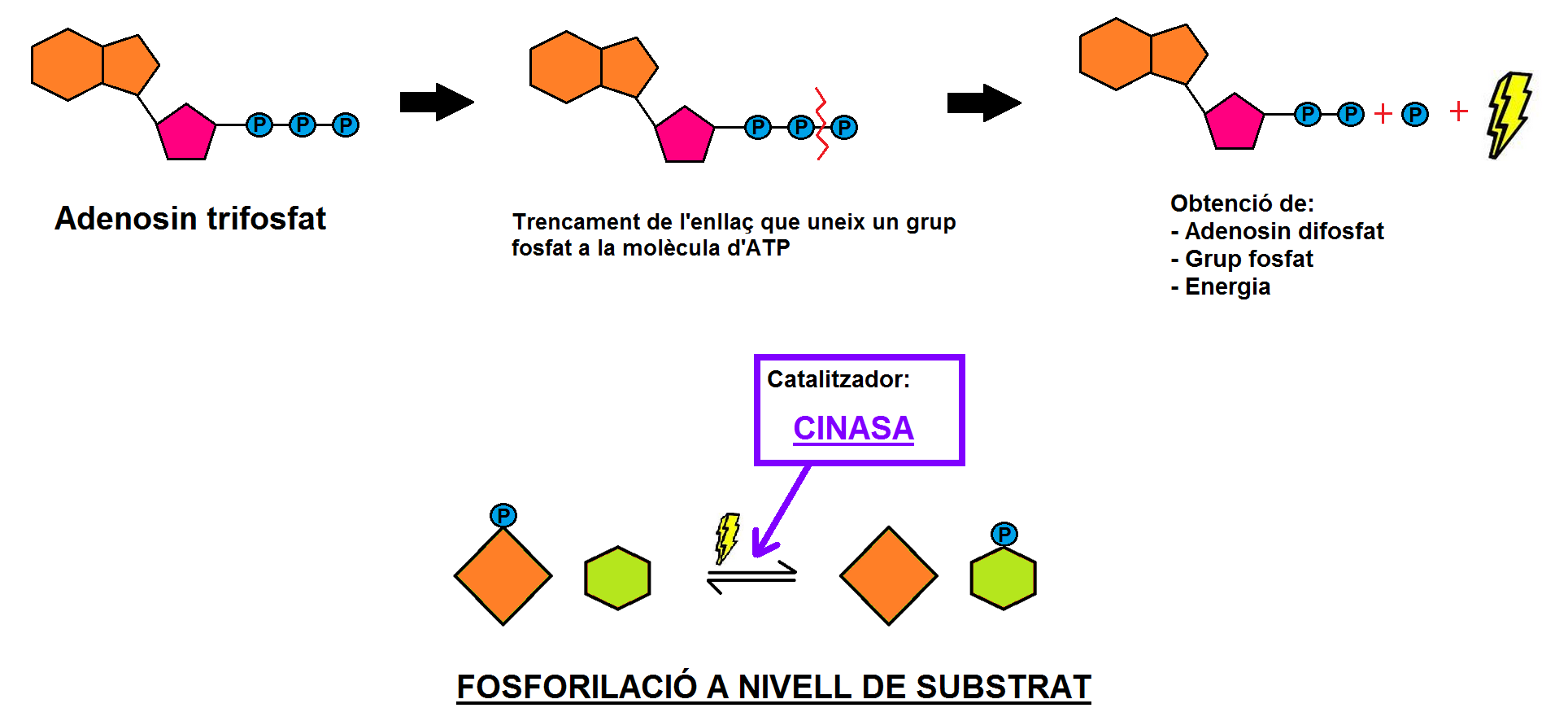 Esquema